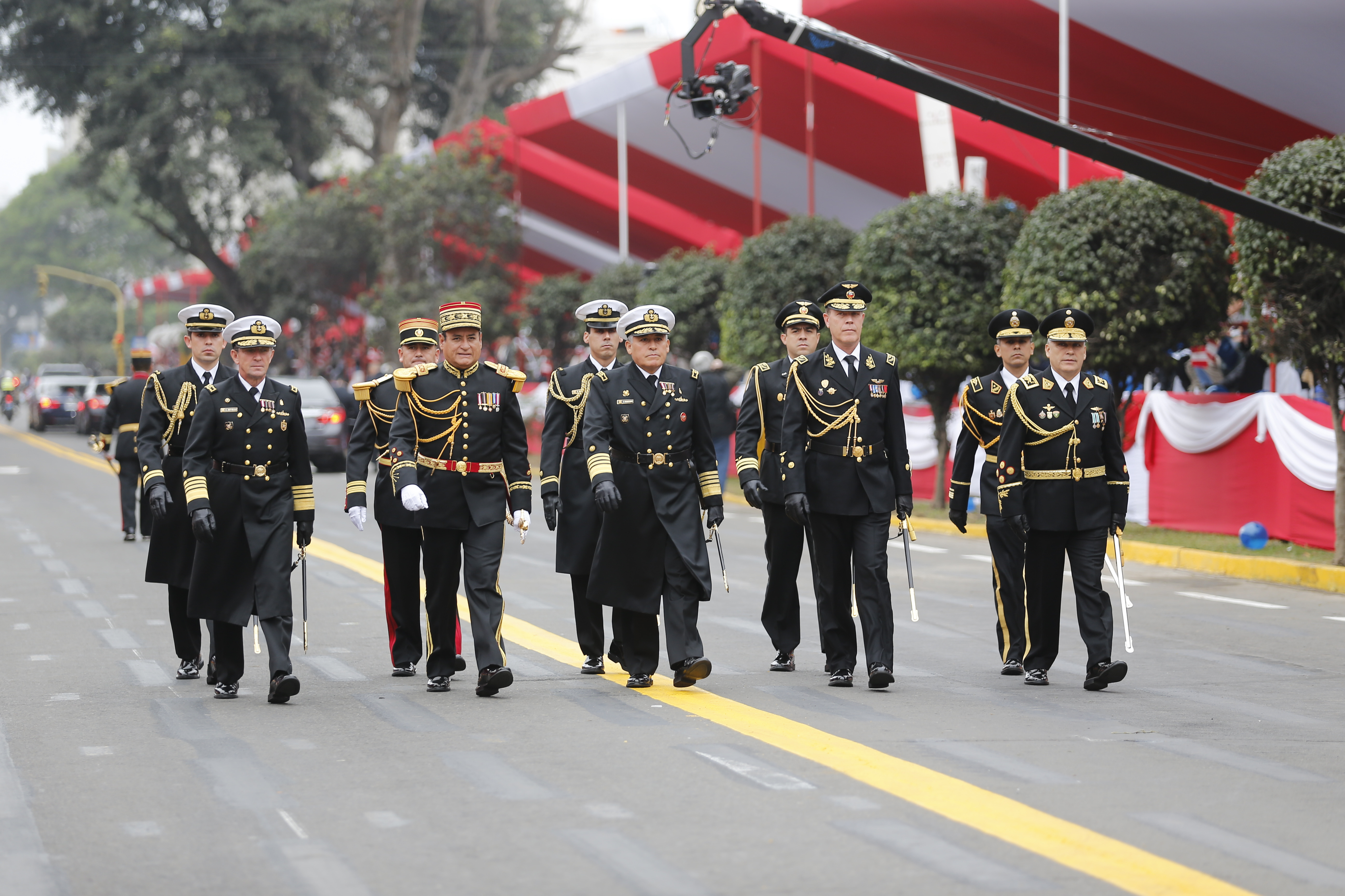 Gran Parada Militar del Perú de 2015.